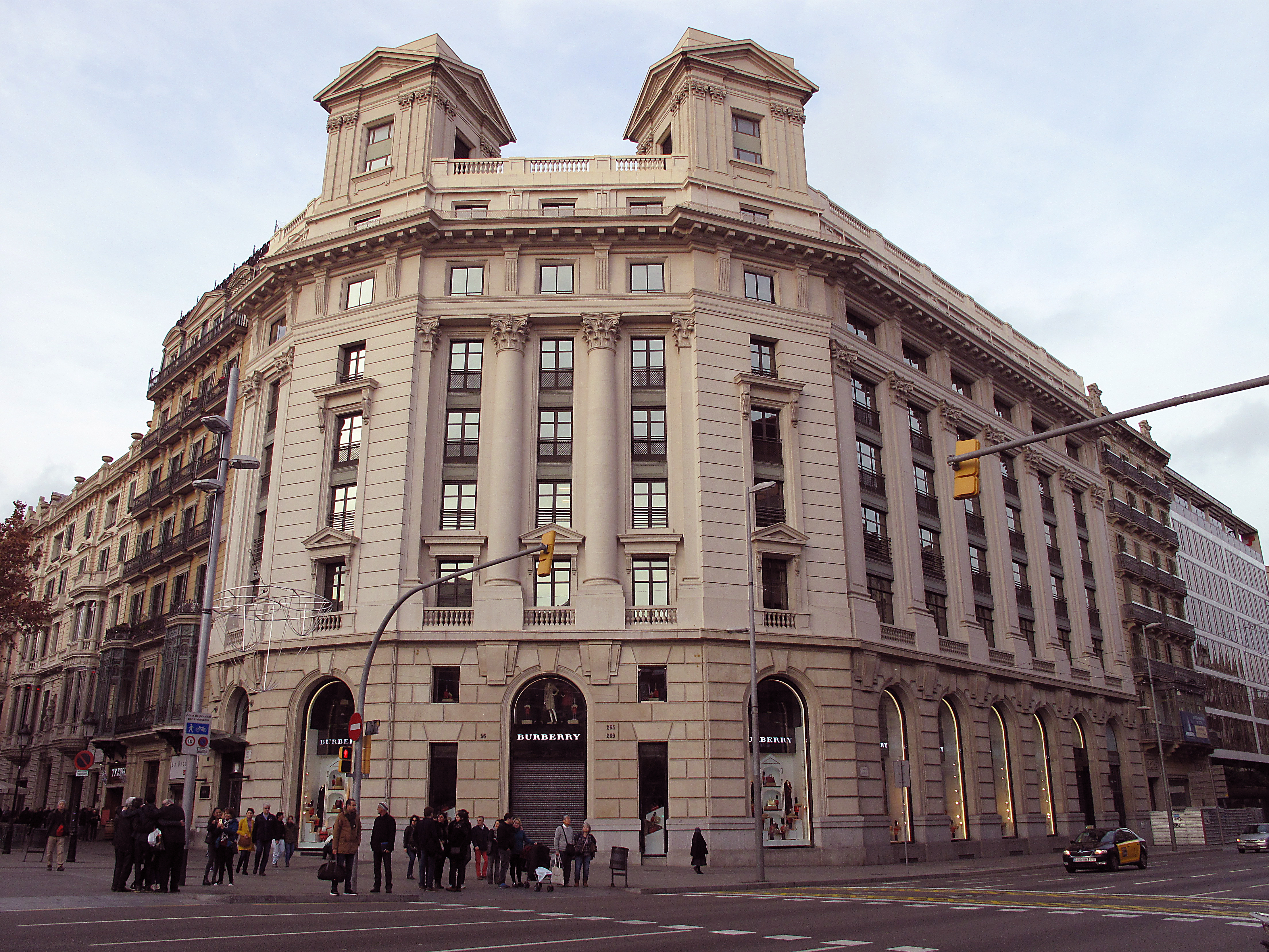 Edifici Cros, pg. de Gràcia 56 (Barcelona), cantonada c. Aragó